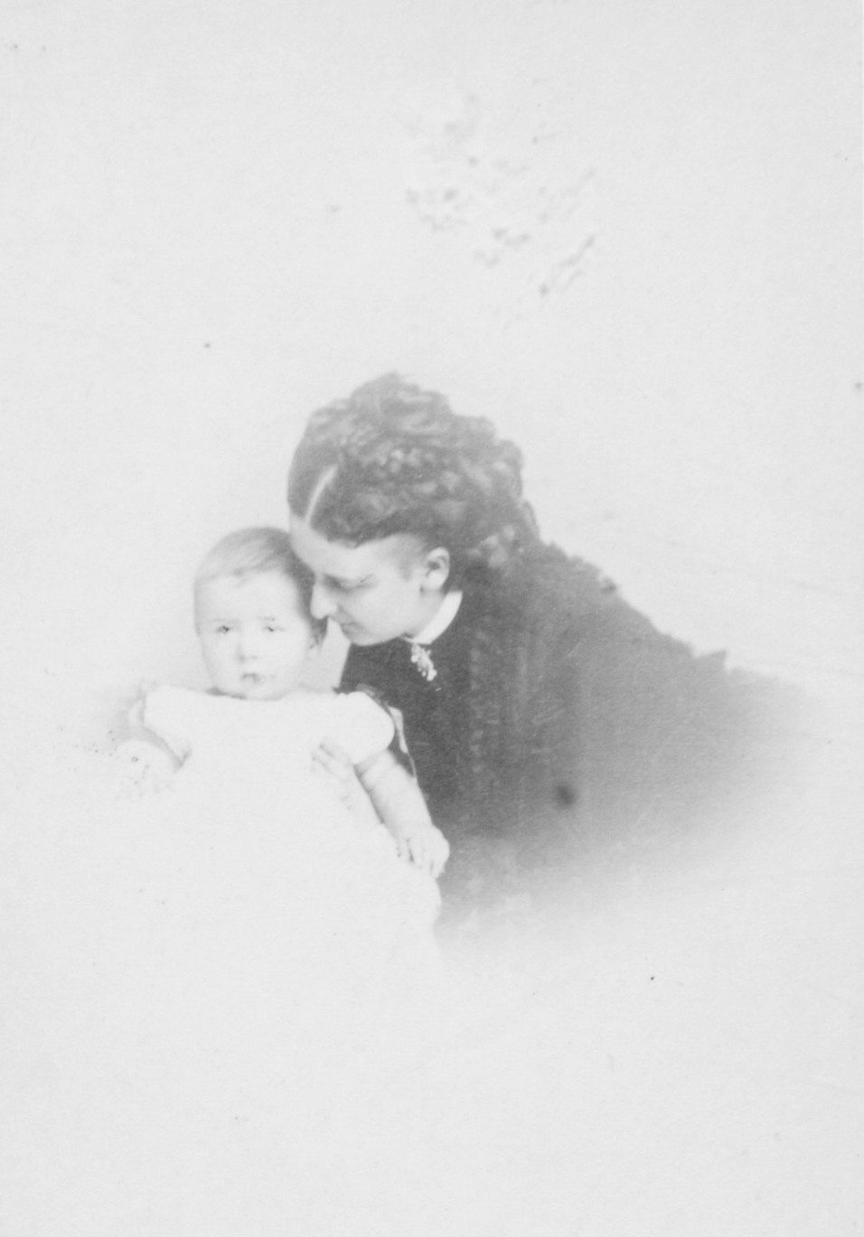 Maria von Hohenzollern-Sigmaringen und Baudouin von Belgien.